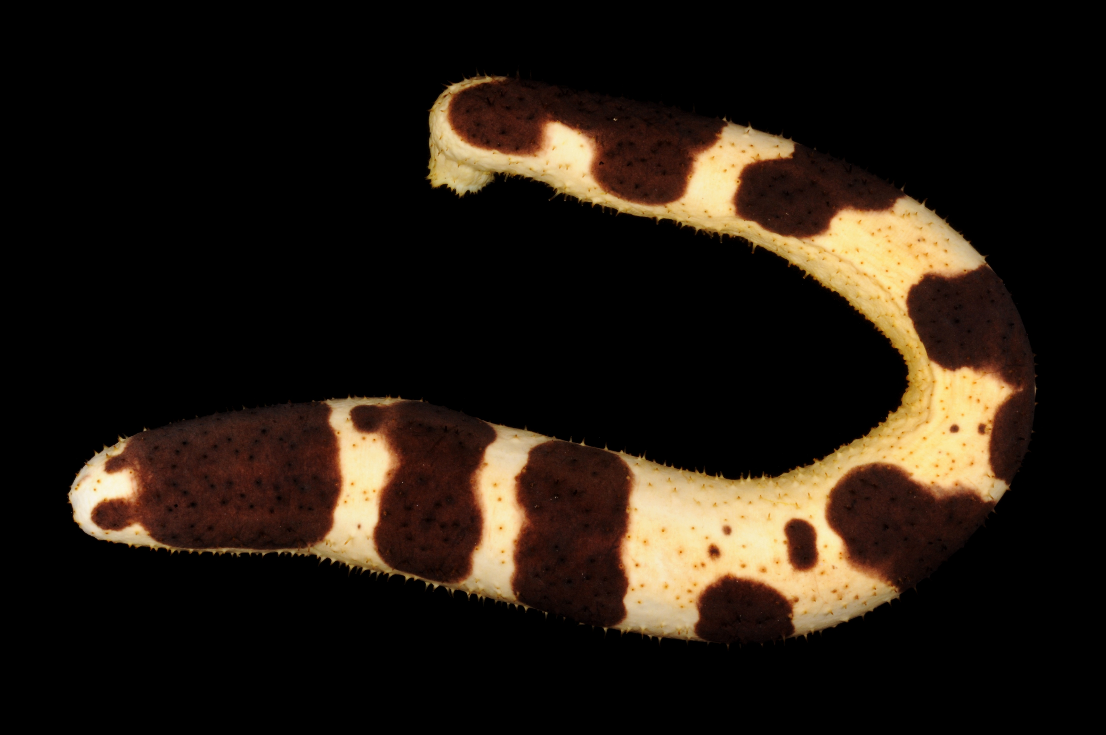 Holothuria nigralutea. Okinawa. 45m. Dorsal side.